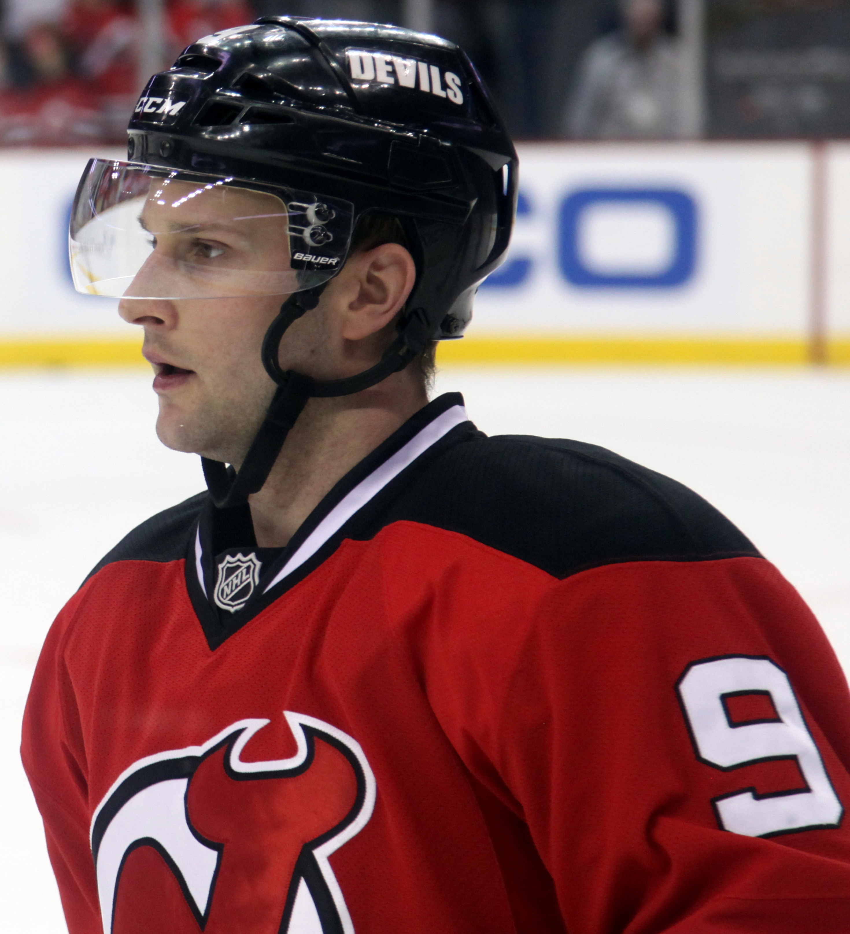 Mike Sislo in 2014.